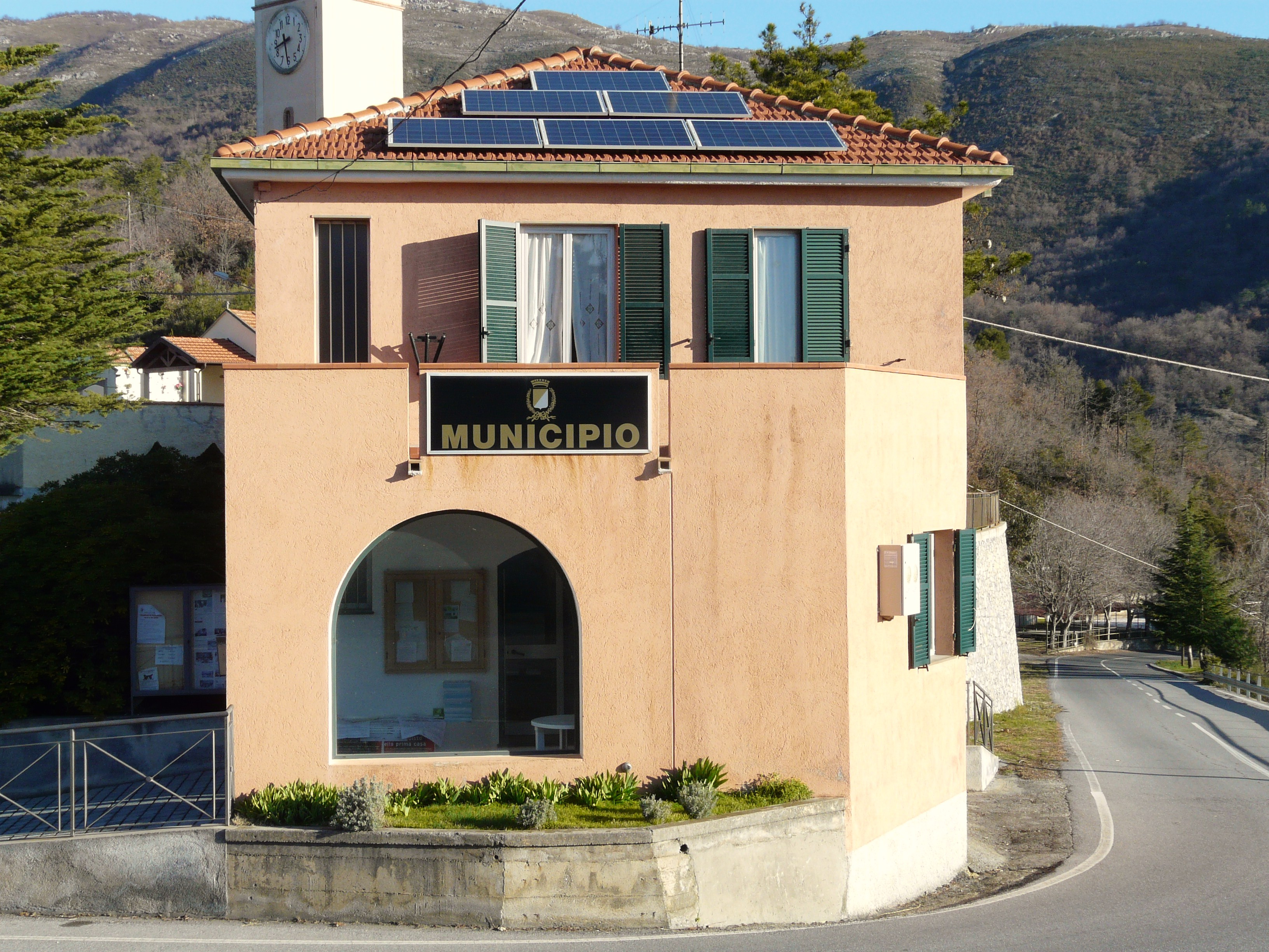 Municipio di Vendone, Liguria, Italia